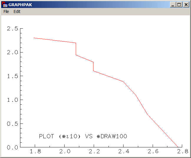 Apparence zipfienne d'une loi uniforme Cette image est extraite d'une session de travail personnelle. Son auteur la met ici dans le domaine public.